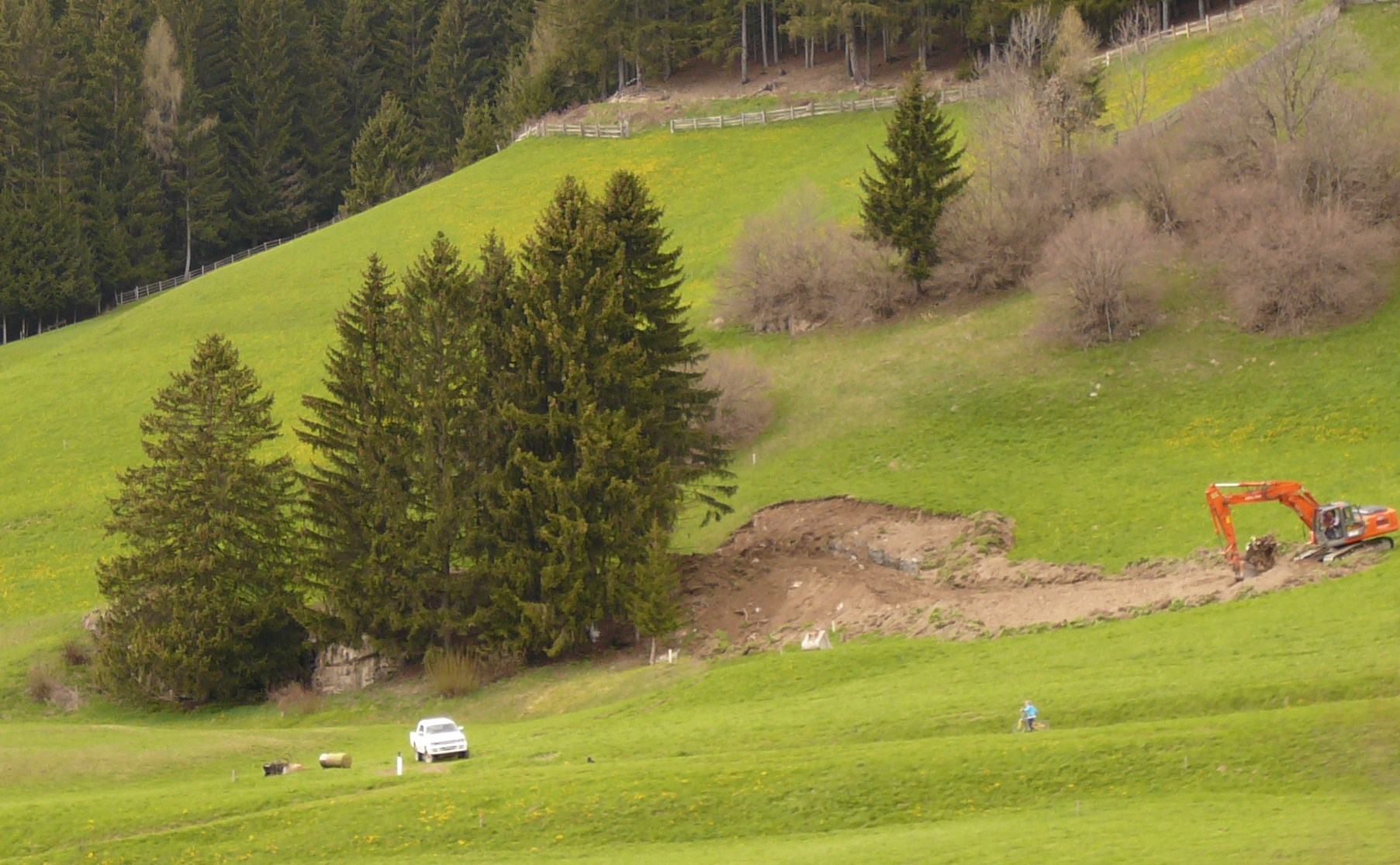 Opera 19, versciaco